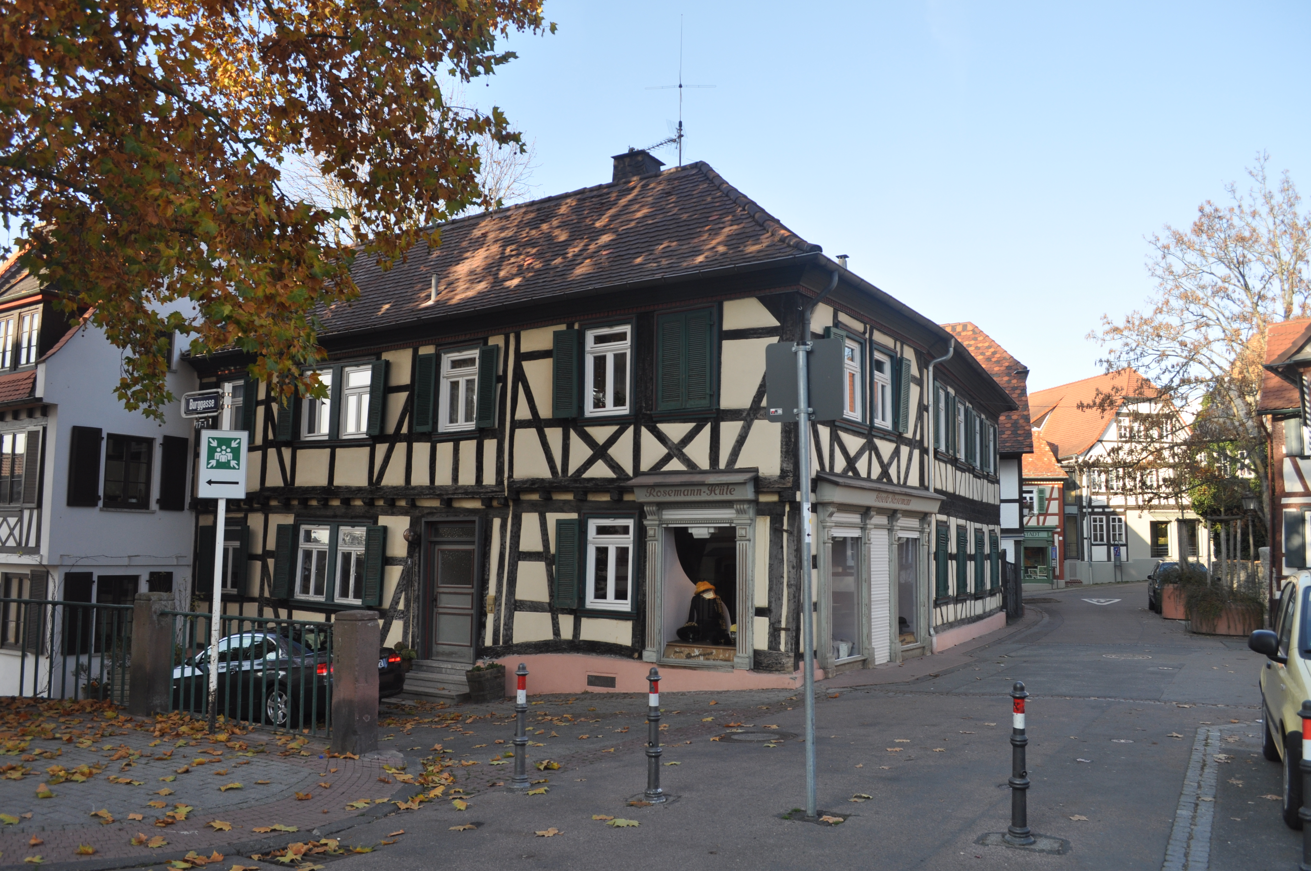 Denkmalgeschütztes Haus Rathausstraße 8 in Bad Homburg